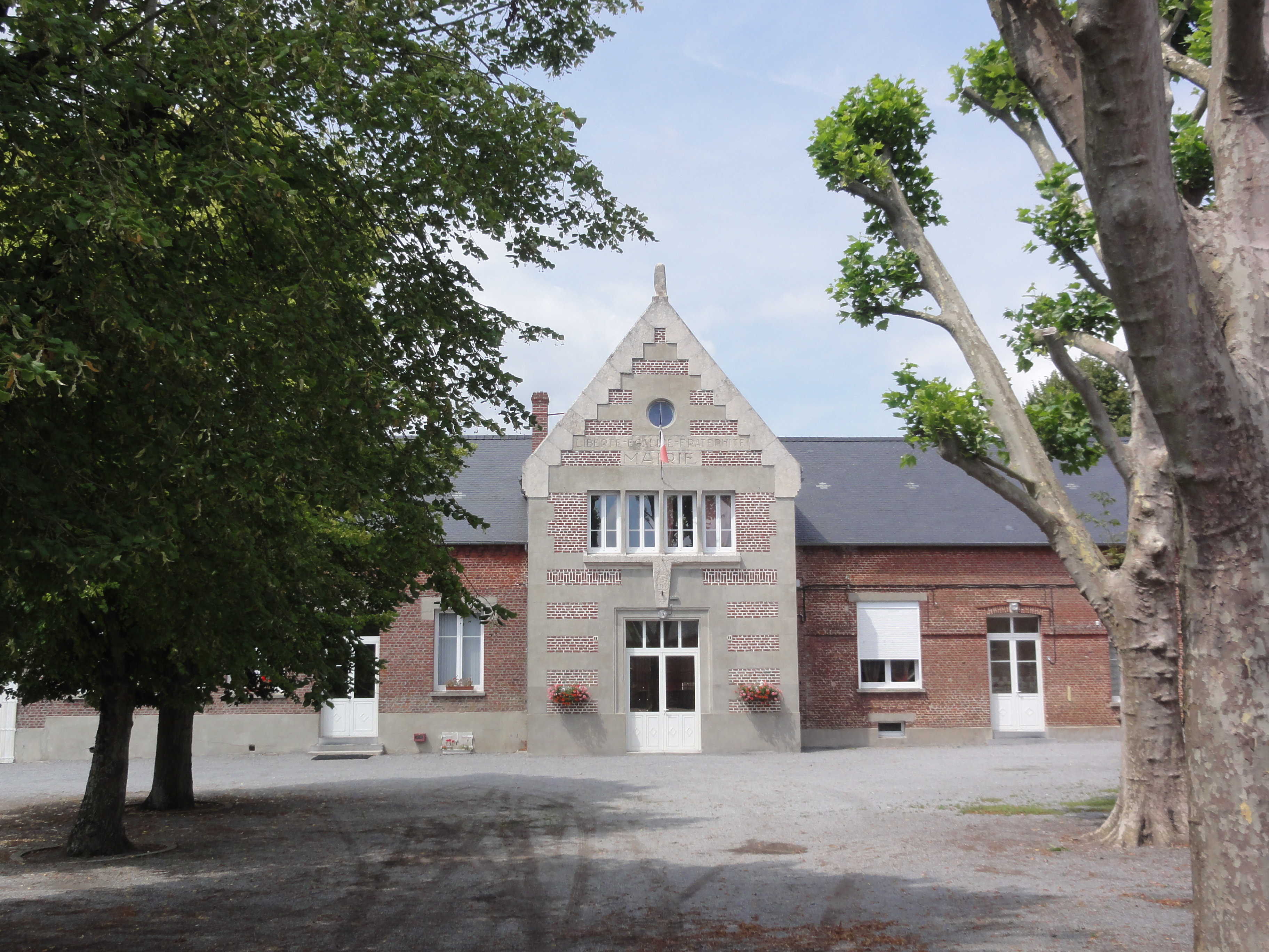 Montigny-en-Arrouaise (Aisne) mairie